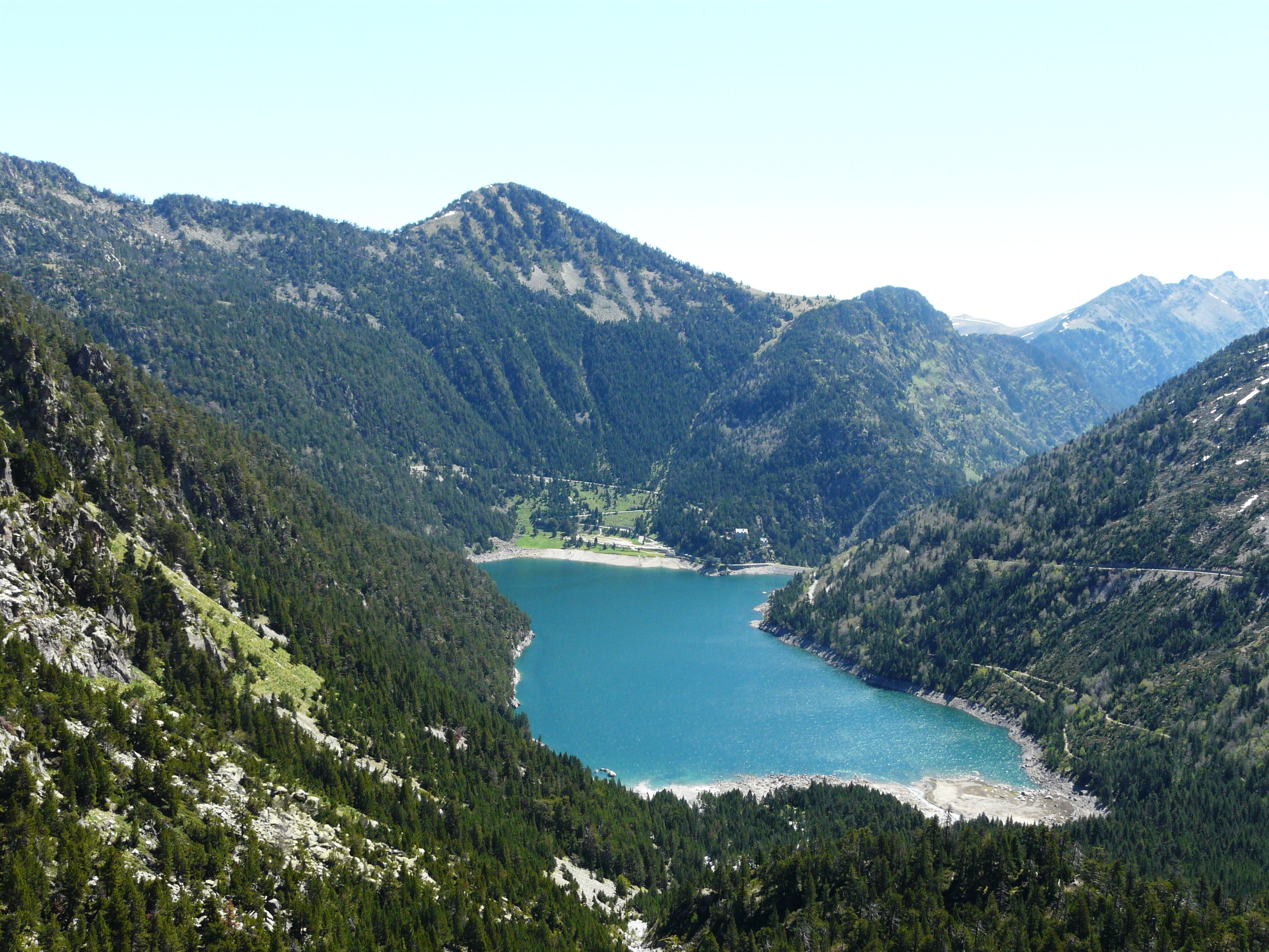 Le lac d'Orédon, Aragnouet et Saint-Lary-Soulan, Hautes-Pyrénées, France. Vue prise en direction de l'est.